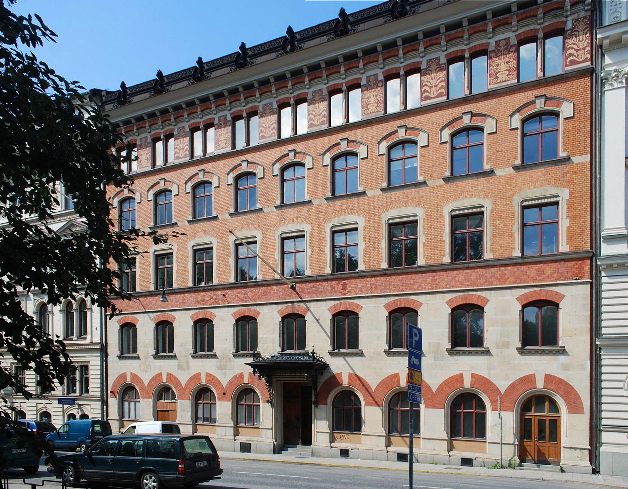 Beskowska skolans byggnad på Engelbrektsgatan 9-11 i Stockholm